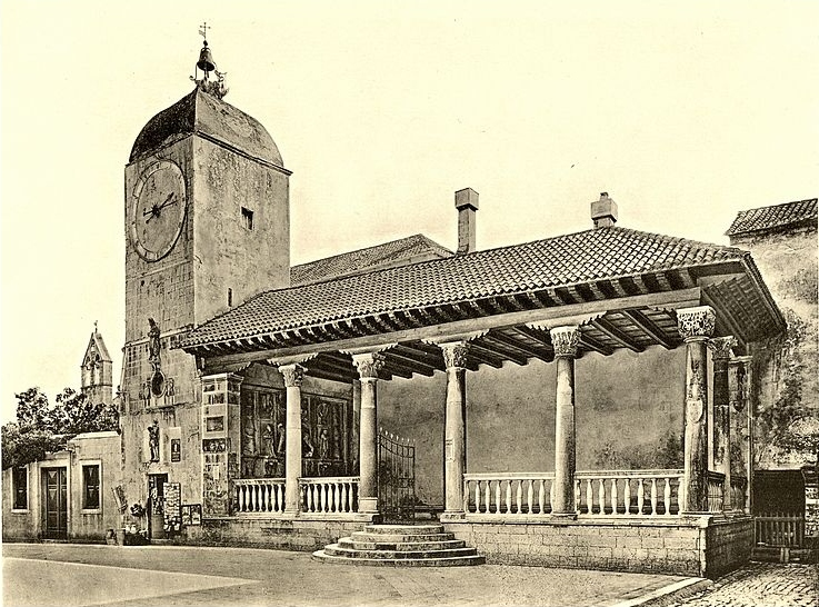 Denkmäler der Kunst in Dalmatien, Herausgegeben von Georg Kowalczyk, mit einer Einleitung von Cornelius Gurlitt. 132 Lichtdrucktafeln nach Naturaufnahmen des Herausgebers Georg Kowalczyk sowie nach Kupfern aus dem Werke von Robert Adam: Ruins of the Palace of the Emperor Diocletian at Spalat(r)o, 1764 Wien, 1910, Verlag von Franz Malota